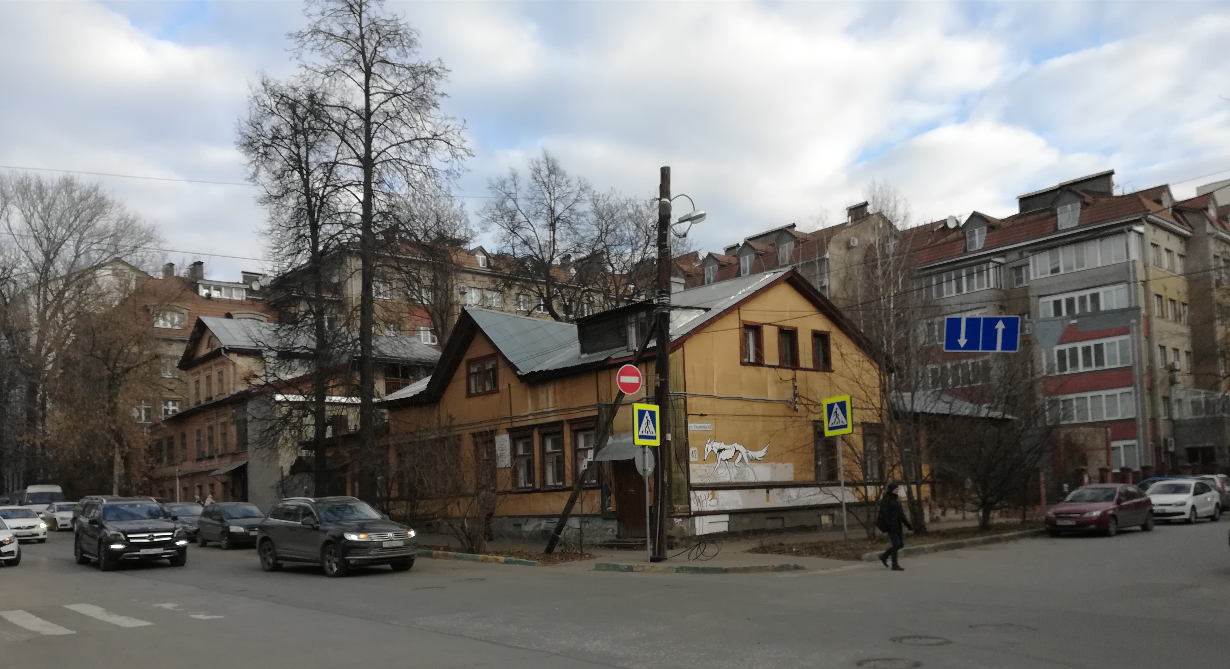 Улица Ульянова